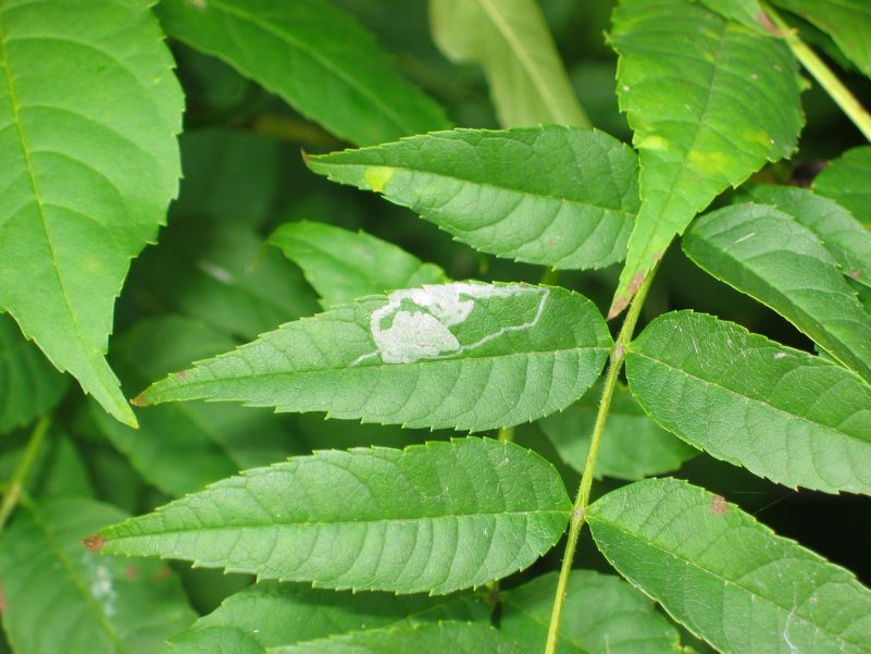 Mine von Caloptilia cuculipennella